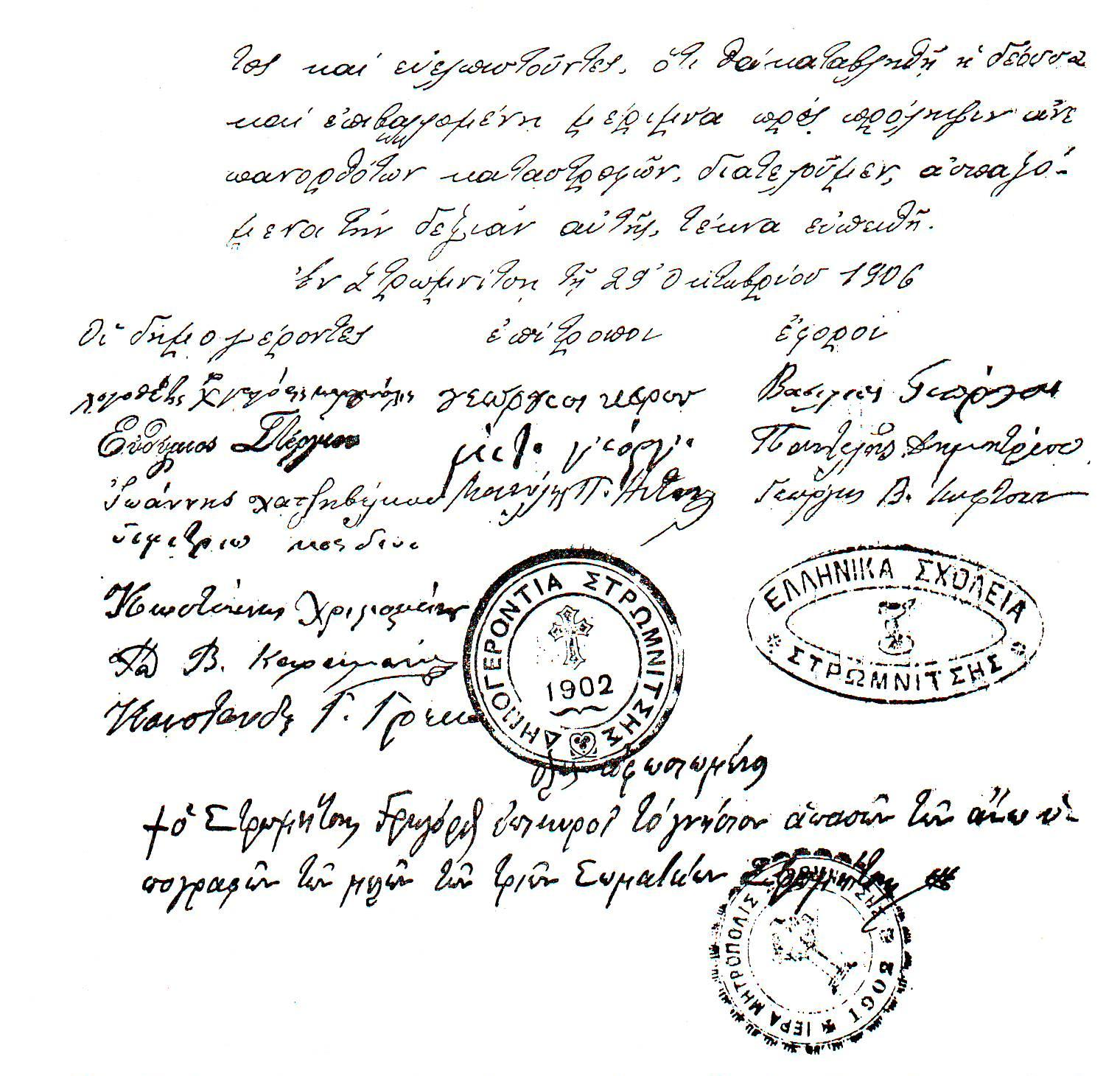 Печати и подписи на митрополит Григориос Орологас, съвета на старейшините и гръцки училища в Струмица